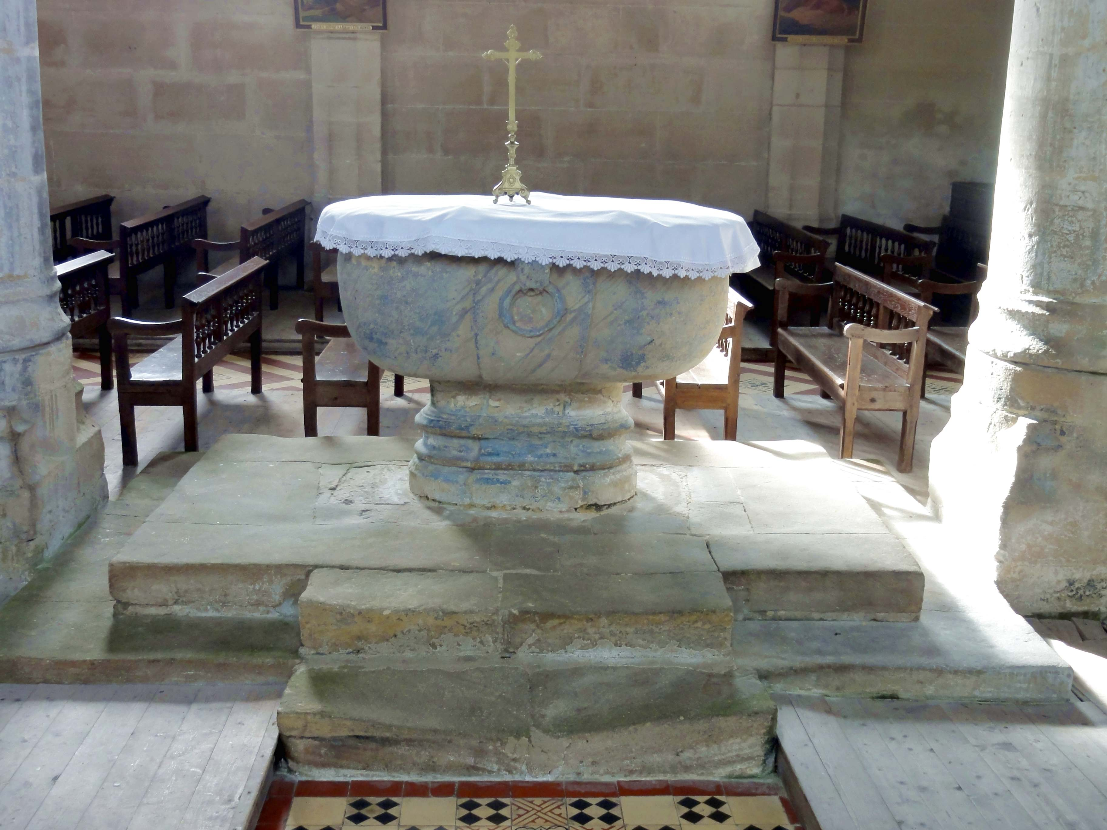 Les fonts baptismaux du XVIe siècle.